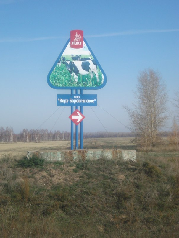 ООО Верх-Боровлянское